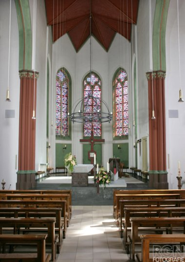 Blick auf den Altarraum in der Kirche St. Silvester zu Erle im Westmünsterland